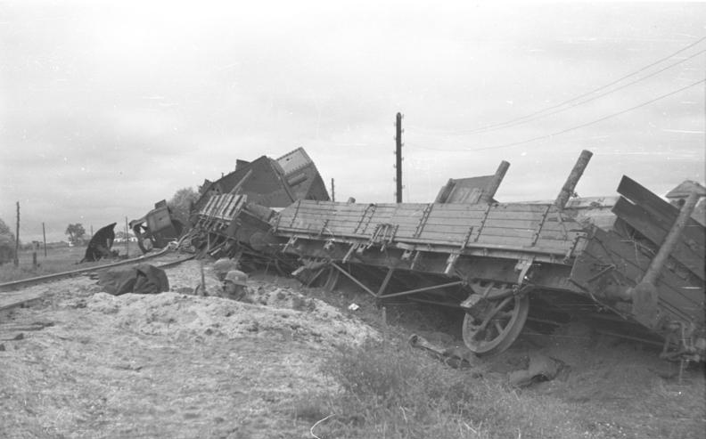 Vernichteter Panzerzug bei Potoki, 4.9.1941